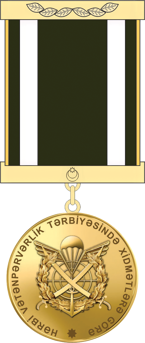 "Hərbi vətənpərvərlik tərbiyəsində xidmətlərə görə" Azərbaycan Respublikasının medalı